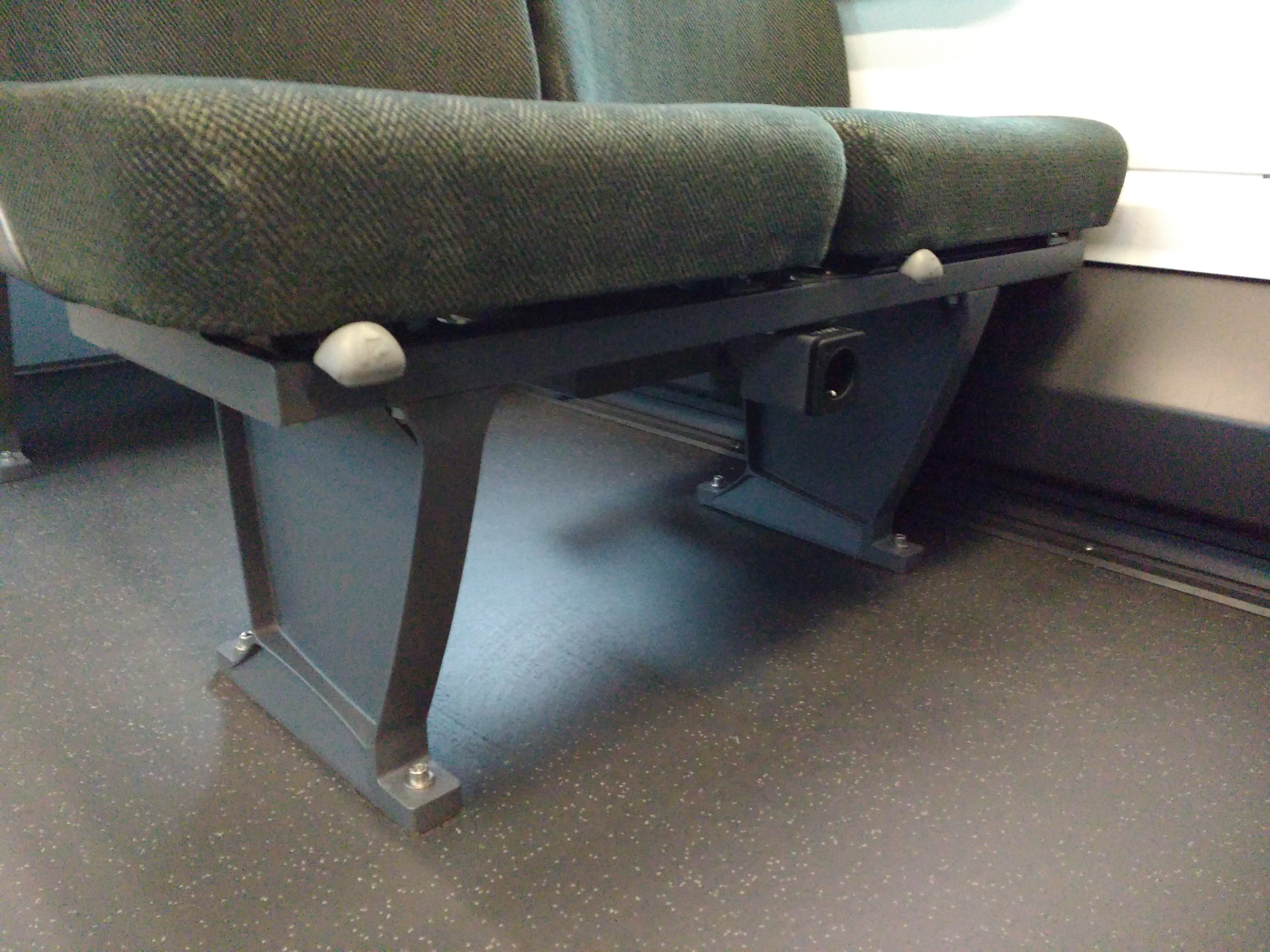 Verstellbare Sitze des ÖBB Railjet (Auslieferung 2016)